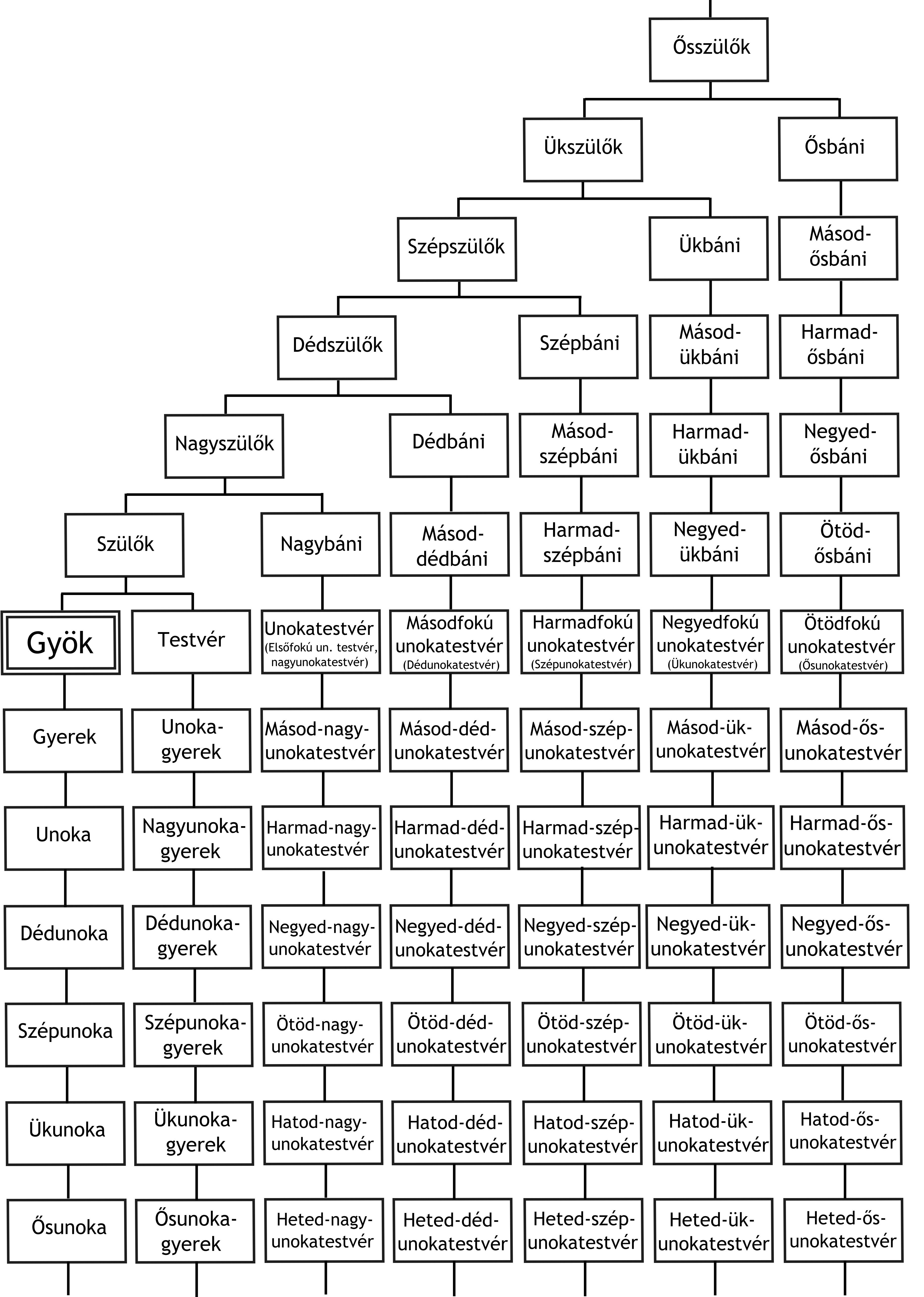 A vérrokonság genenalógiai alapsémája, Szegedi László rokonsági terminológiájával. Általános genealógia. Budapest, 2015. 113. The Hungarian genenalogical terminology of László Szegedi (Általános genenalógia. Budapest, 2015. p. 113.)